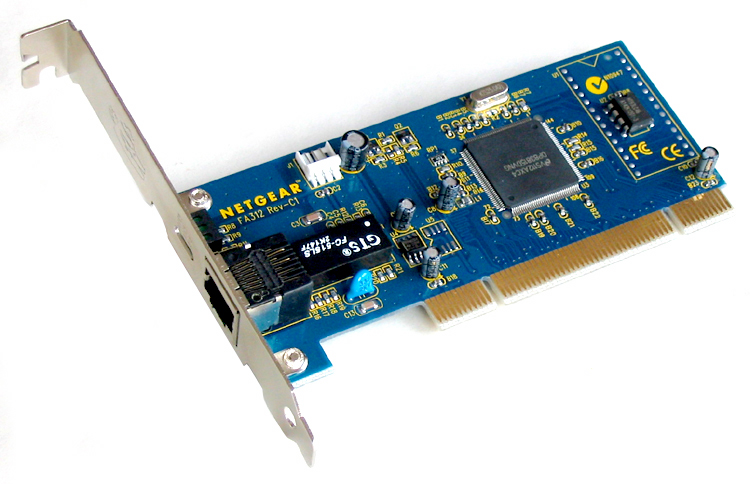 Netzwerkkarte FA312 von Netgear, aus einem meiner Server.